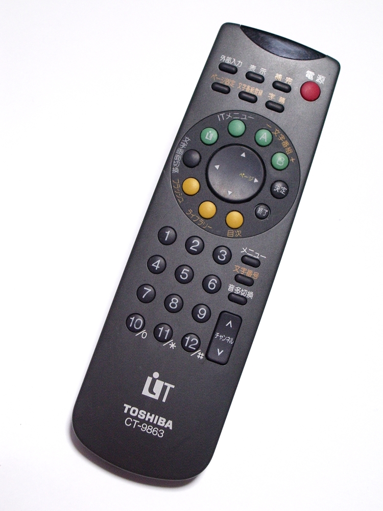 東芝のITビジョン（データ放送）受信機用リモコン。